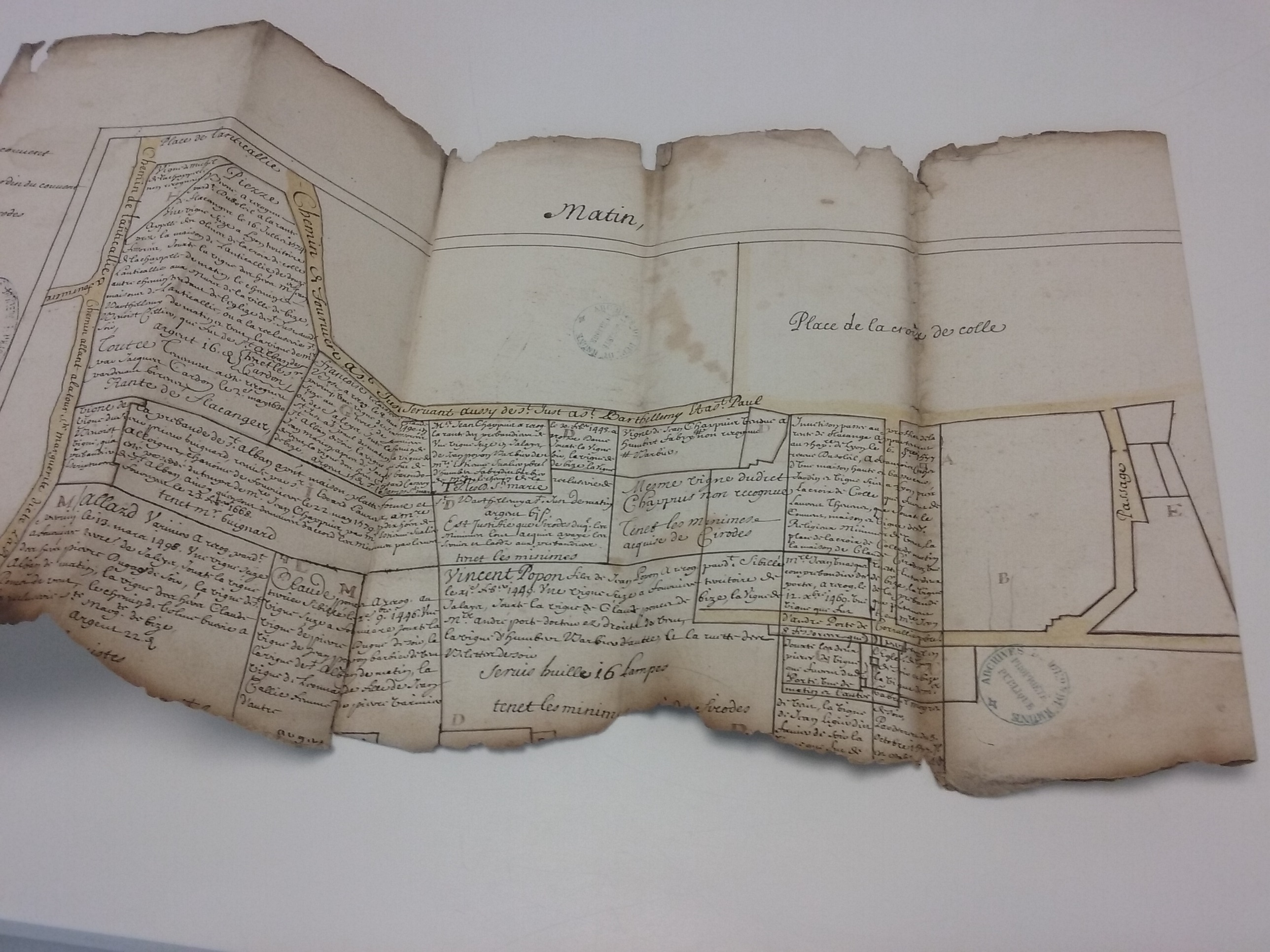 12 G 510 détail 2. Cartes et plans pour les servis et redevances, XVIIe-XVIIIe s